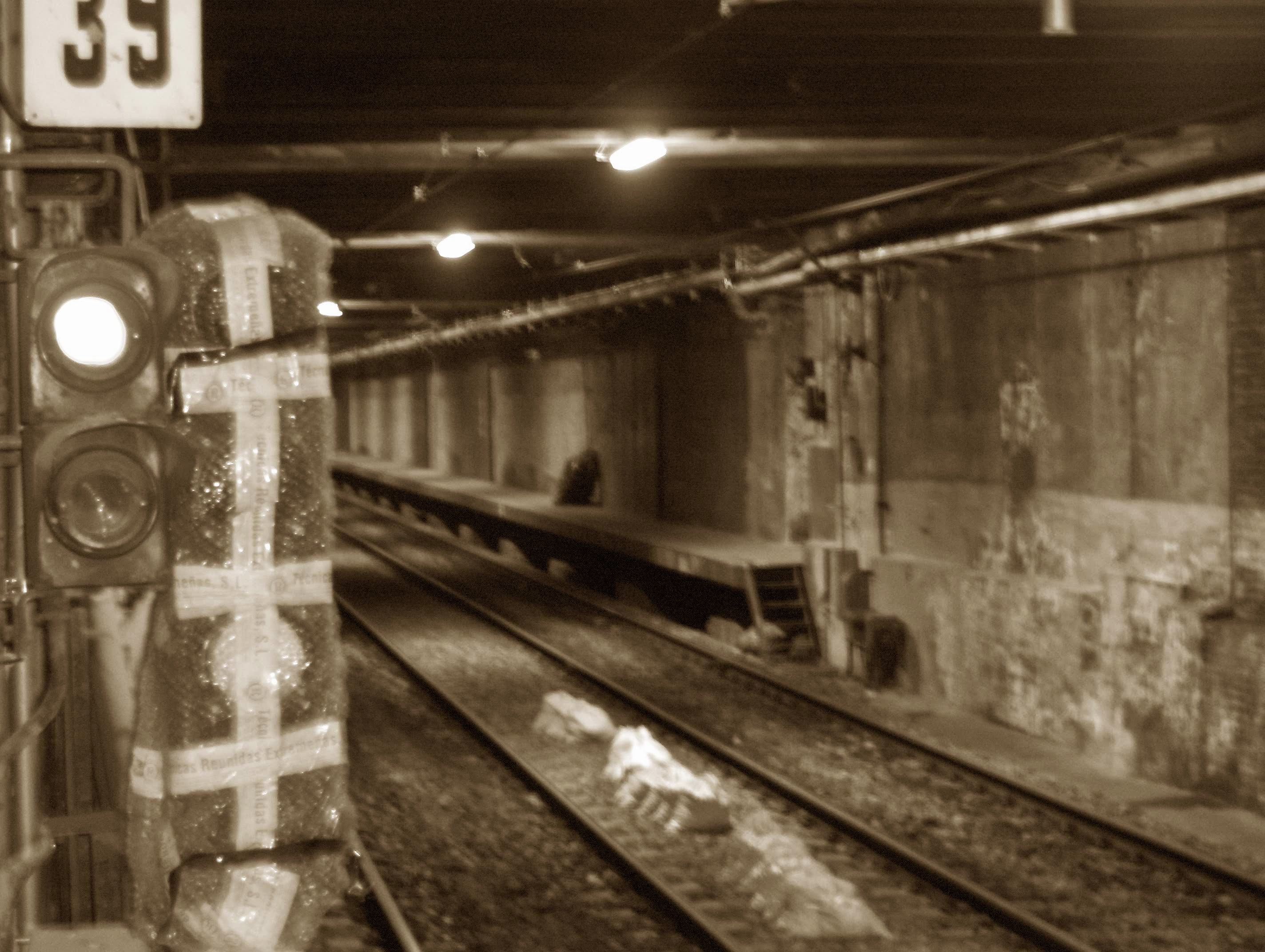 La clausurada estación Pasco sur de la Línea A del Subte de Buenos Aires, Argentina.